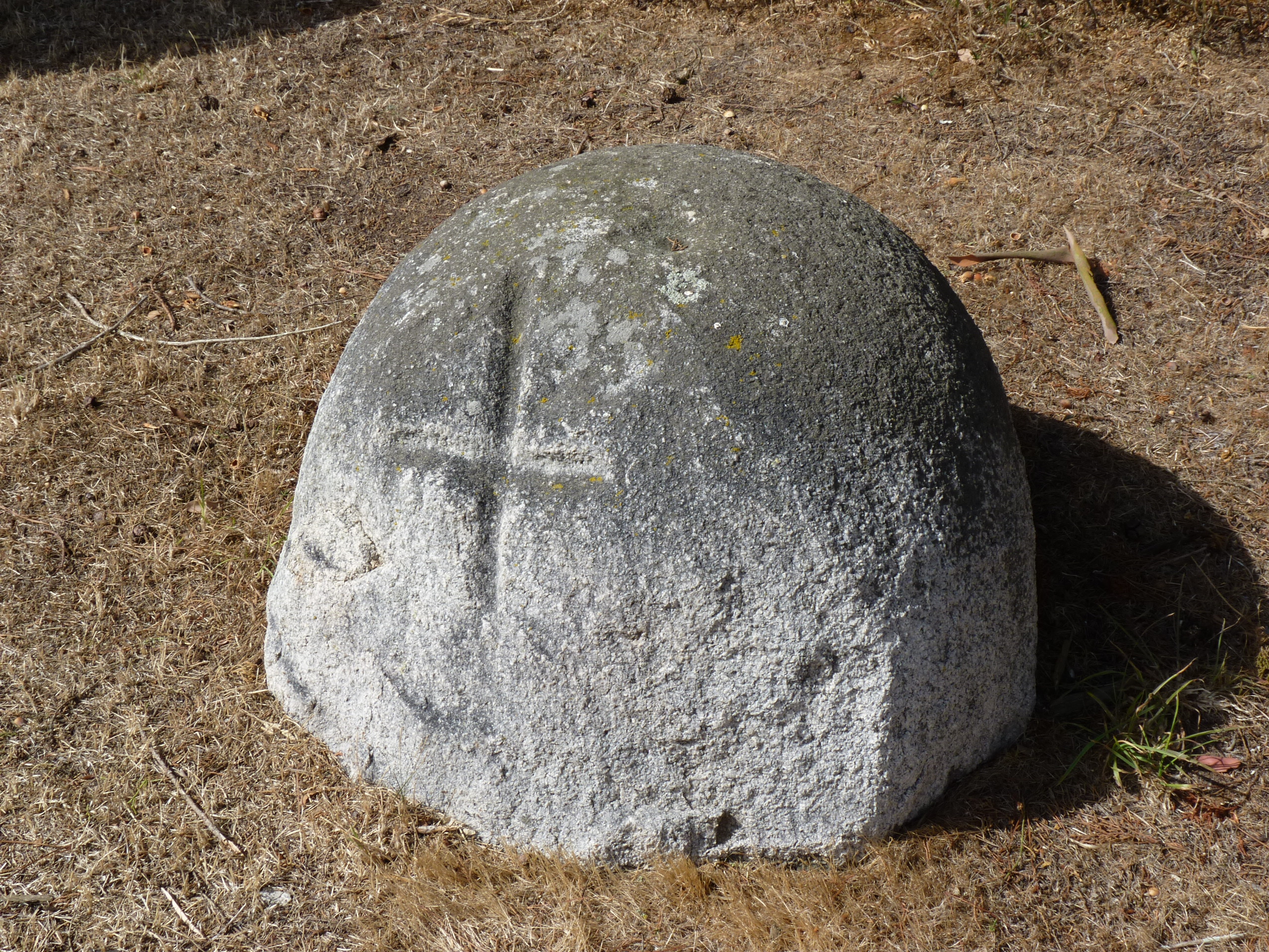 Stèles découvertes dans les champs avoisinants et exposées en bordure de route. Stèle christianisée.